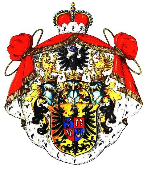 Wappen Fürst Radziwiłł